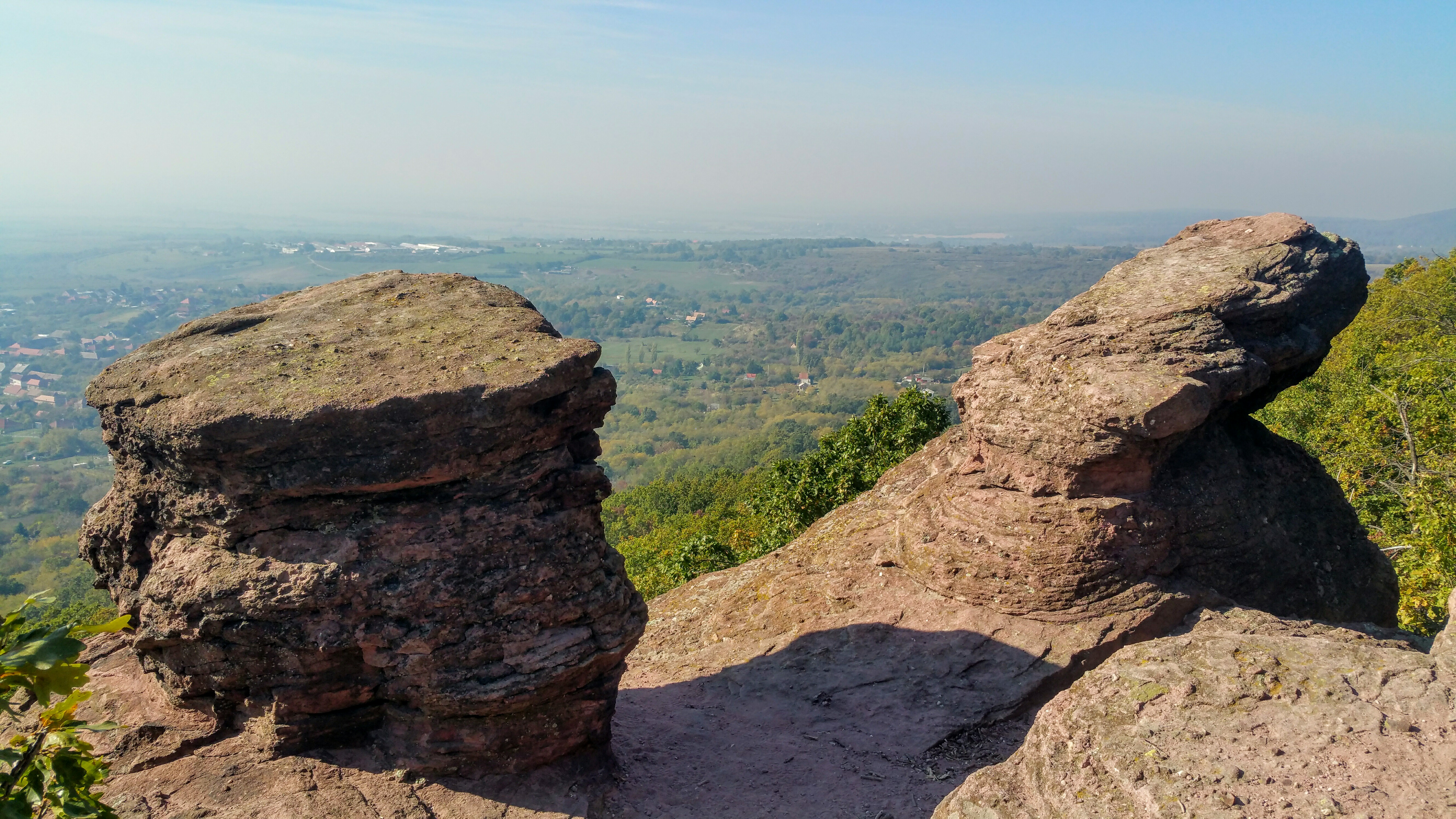 A babás-szerkövek a monda szerint pedig két dölyfös, egymással versengő család lakodalmas menete vált itt kővé, mert nem voltak hajlandóak egymás útjából kitérni. Mindenesetre a kilátás parádés (tiszta idő esetén) a mecsekaljai kis falvakra, Cserkútra, Kővágószőlősre.